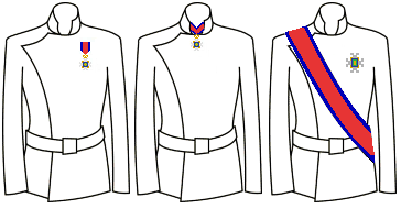 Modo di indossare le decorazioni dell'Ordine di Francesco I (Regno delle Due Sicilie)